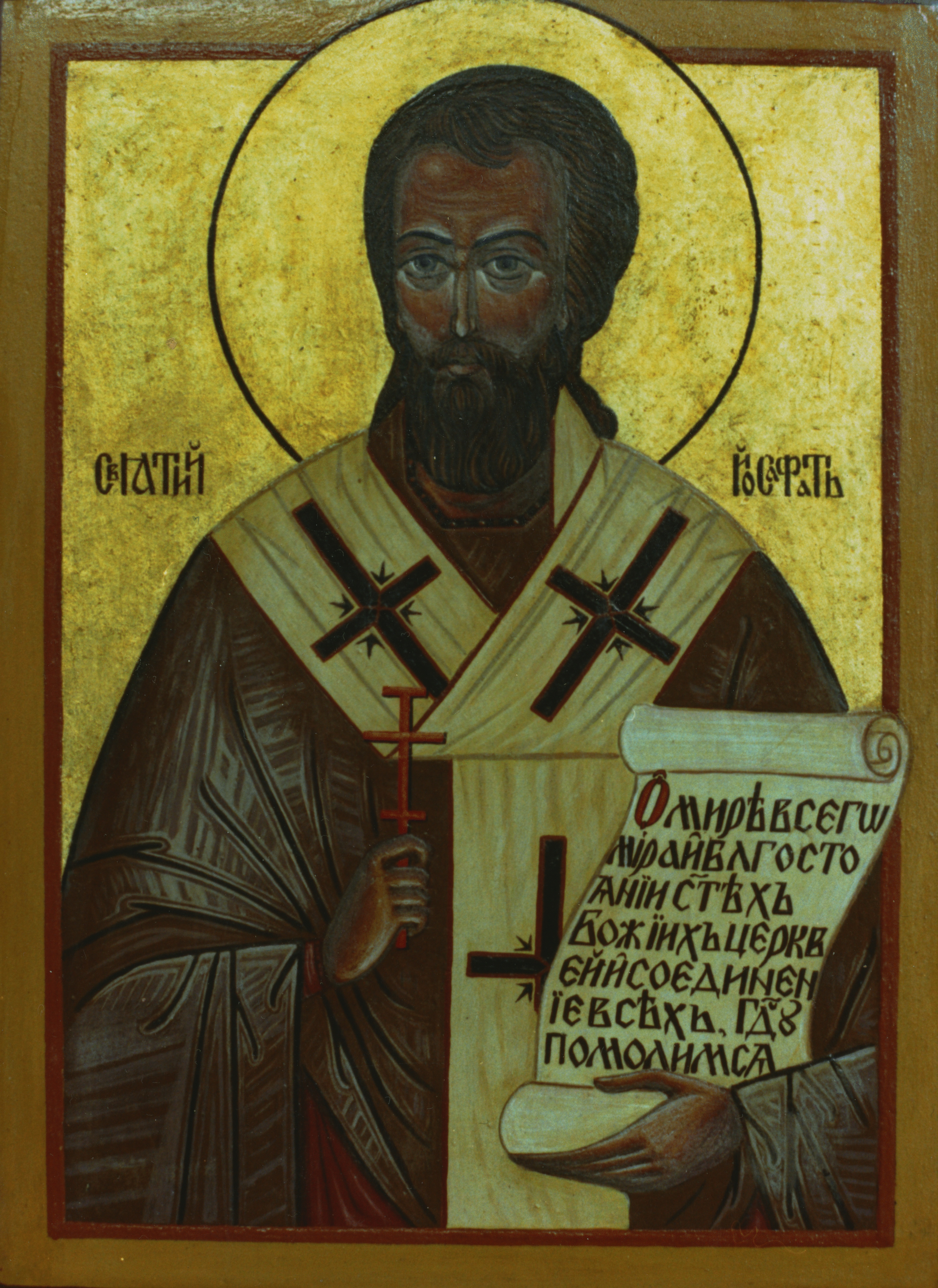 Jozafát Kuncevič, ikona namaľovaná Gregorom Plančákom, nachádzajúca sa u ukrajinských baziliánov v Ríme, foto z r. 1989. Photo taken by Jozafát Vladimír Timkovič, OSBM